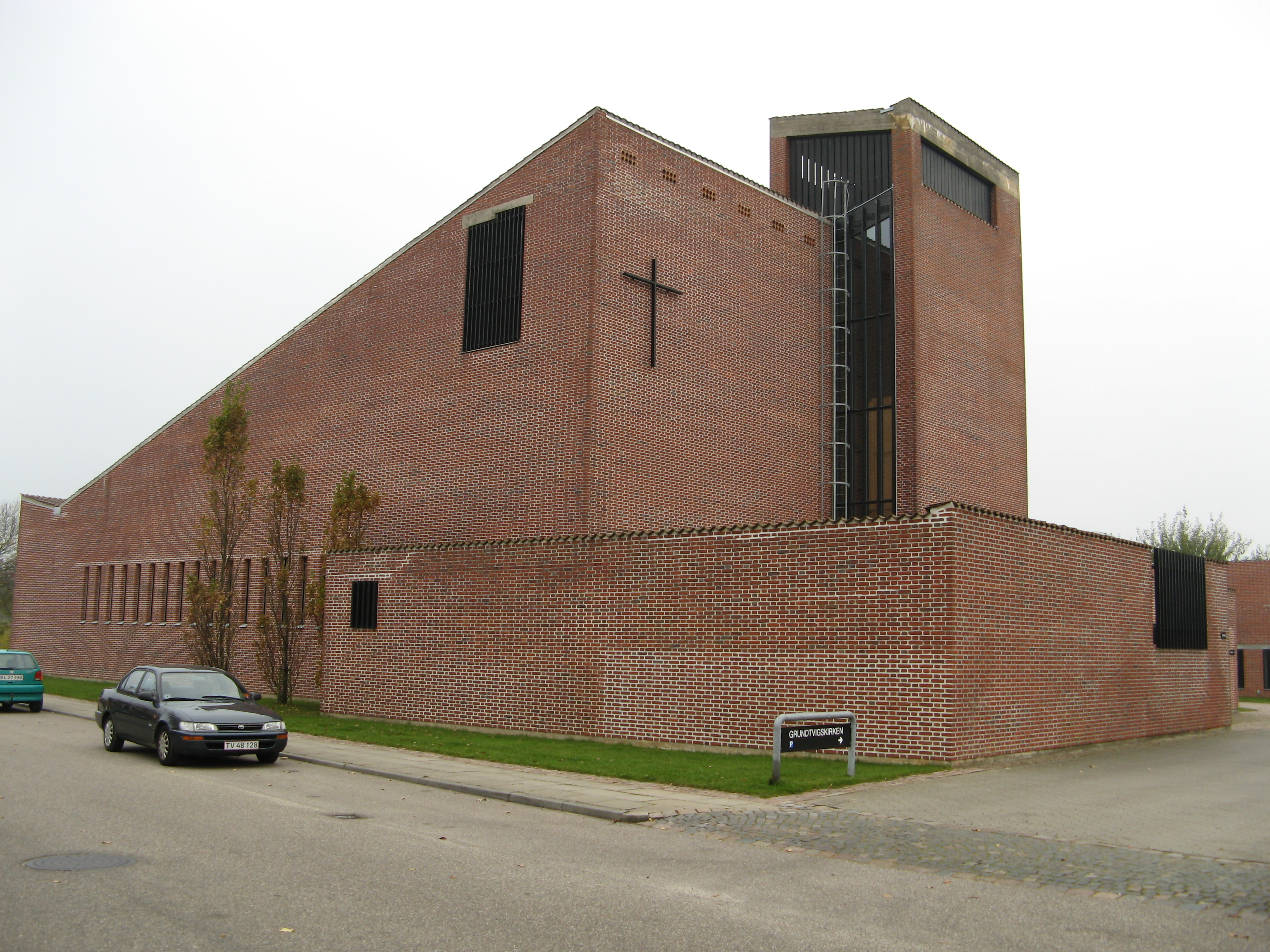 Grundtvigskirken, Grundtvigs sogn, Esbjerg kommune (former: Skads Herred, Ribe Amt). Kirken set fra nordøst